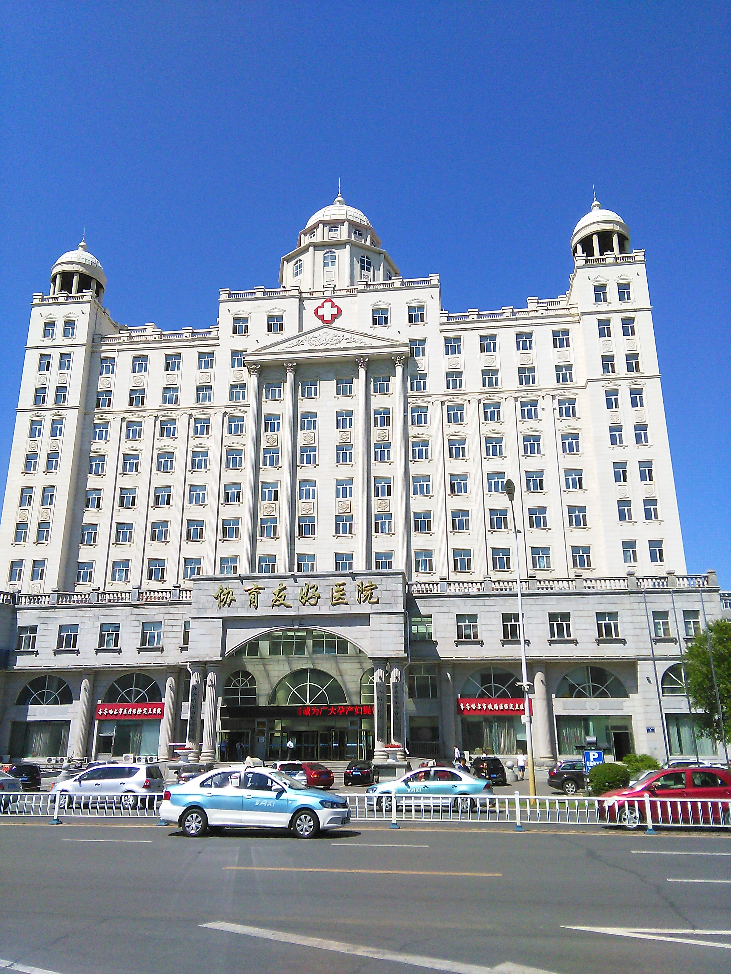 中文（中国大陆）: 齐齐哈尔第二医院2017夏